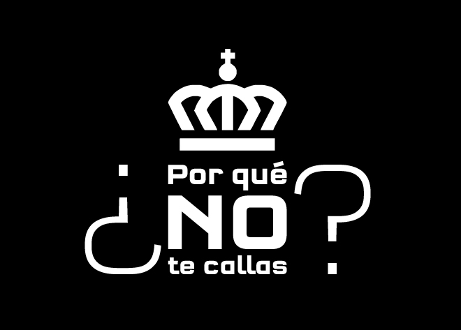 Diseño de camiseta con el lema ¿Por qué no te callas?